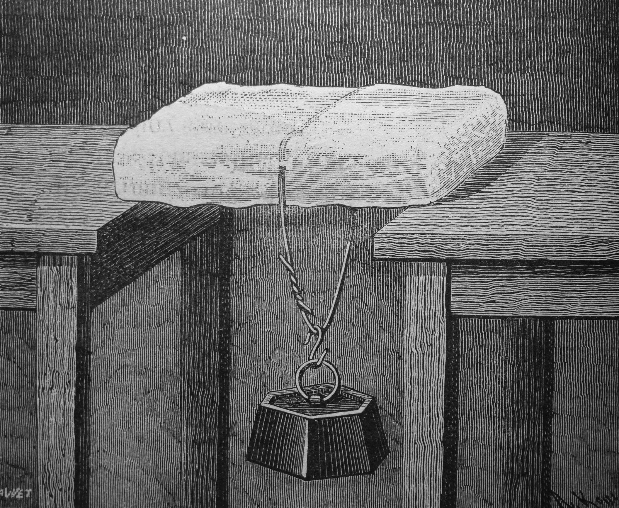 Expérience de John Tyndall (1820-1893). Un pain de glace est supporté à ses deux extrémités. Un fil lesté d'un poids est posé transversalement sur le pain de glace. Sous l'effet de la pression due au fil la glace fond localement, le fil descend dans le bloc de glace, et l'eau redevient solide après le passage du fil, lorsque la pression redevient normale. Le fil traverse ainsi le bloc de glace sans le rompre.